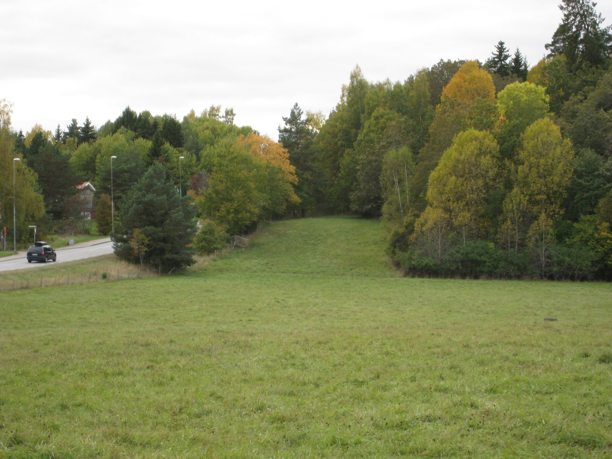 Högby gamla gårdsplats vid Råstensvägen i Viksjö, Järfälla, Stockholms län. Gården låg till höger uppe på höjden.